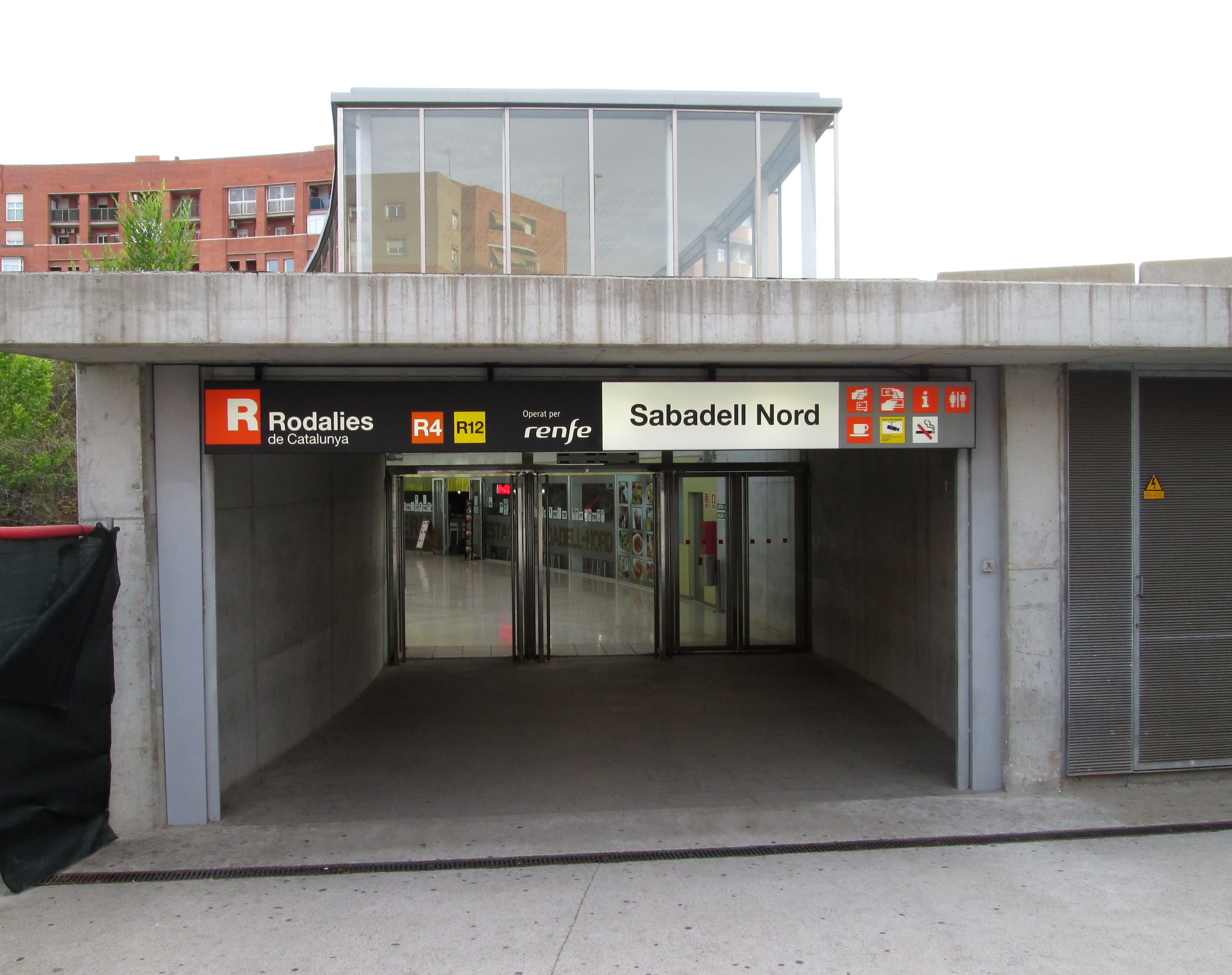 Estación de tren de RENFE Sabadell Norte, situada en la Plaza de España.